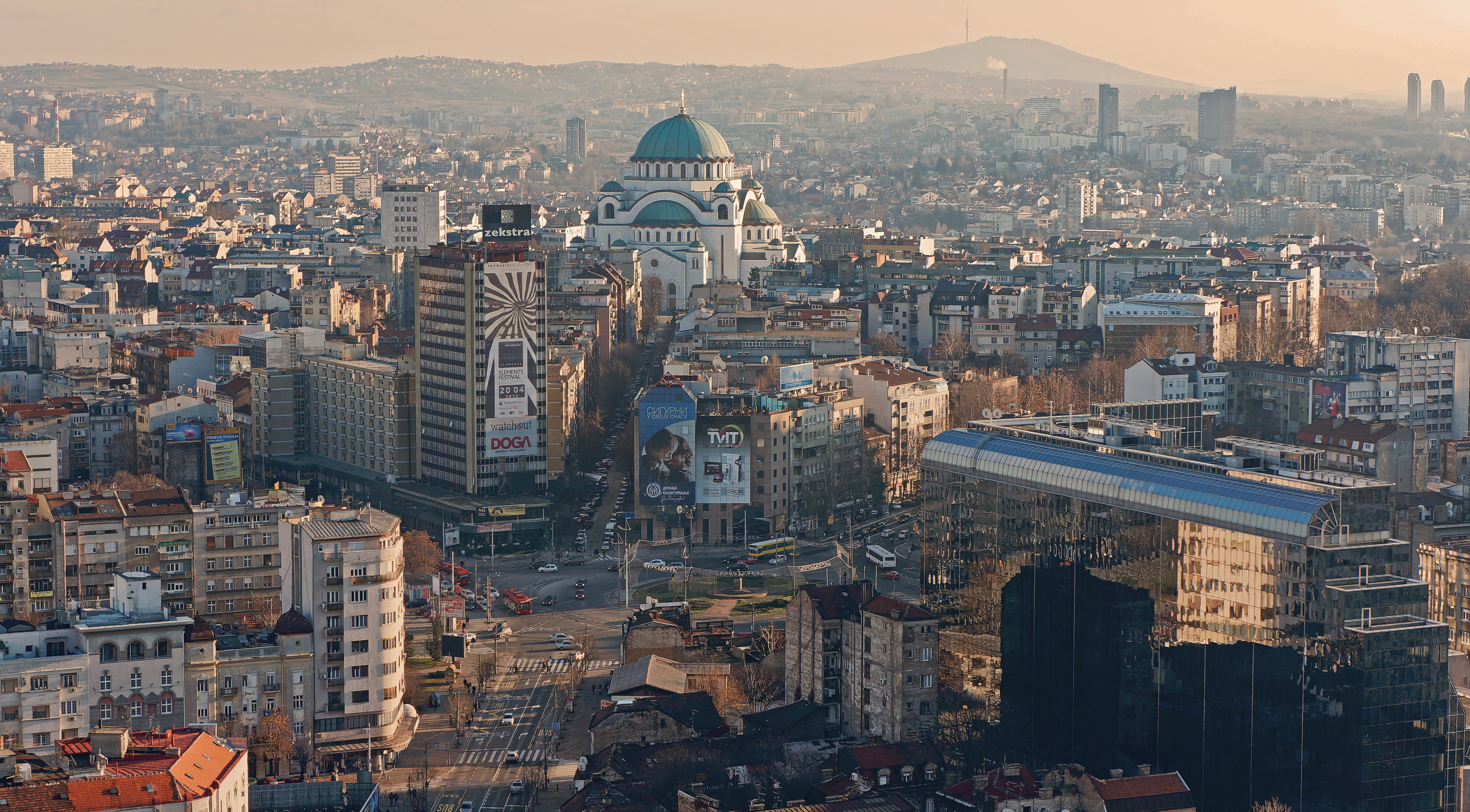 Aufnahme vom Dach der "Belgraderin" (Bürogebäude,101m) in Richtung des Tempels des heiligen Sava